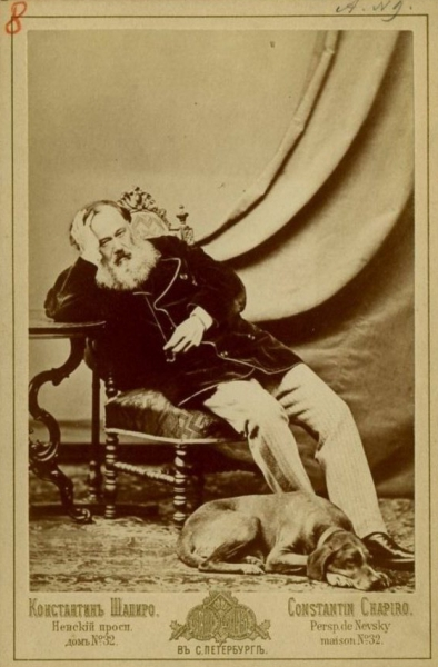 Оригинал портрета В.М. Лазаревского, с которого в 1886 году была сделана копия в ателье Шапиро. Снимок обрезан.